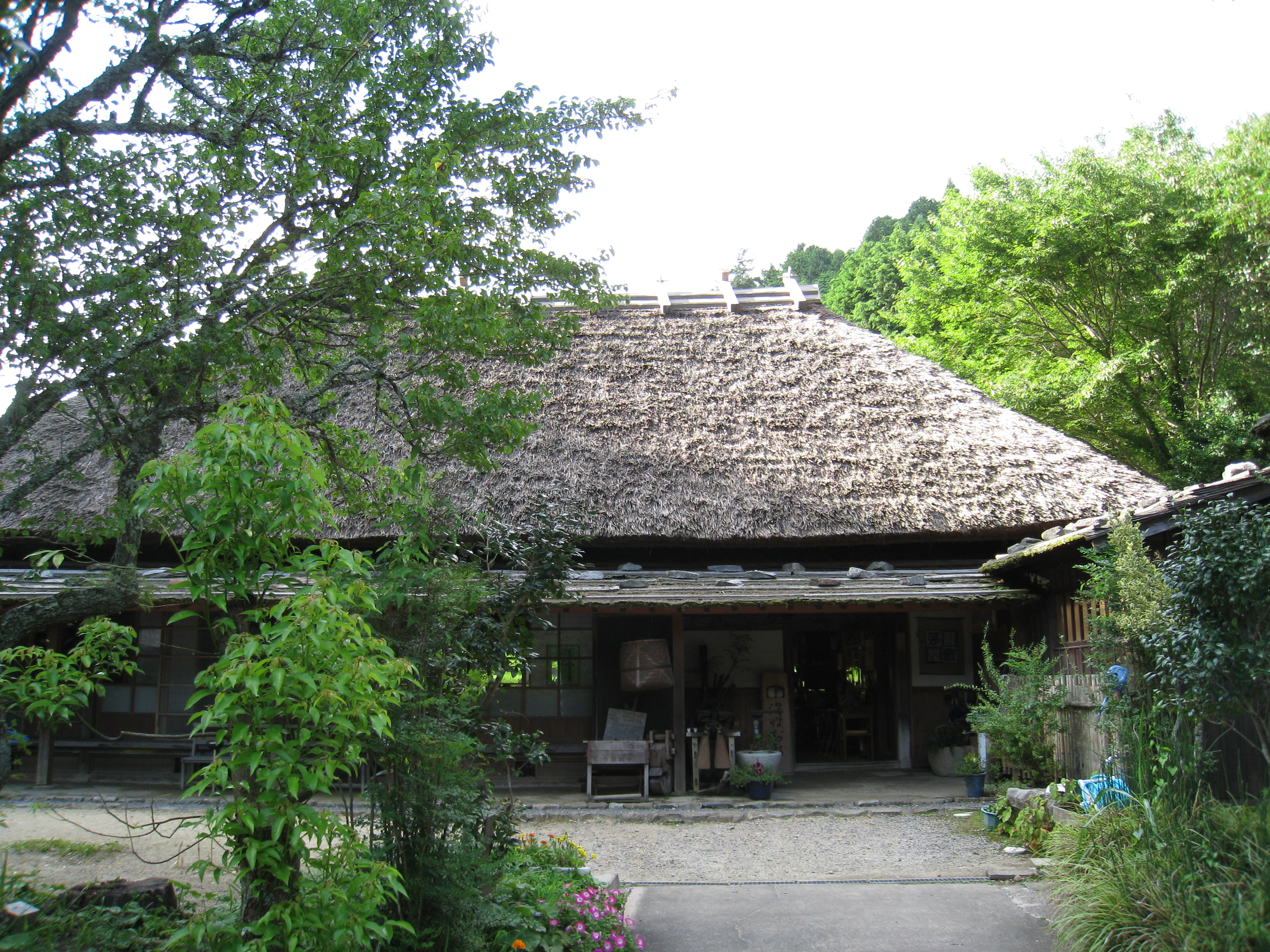 千万町茅葺屋敷その２